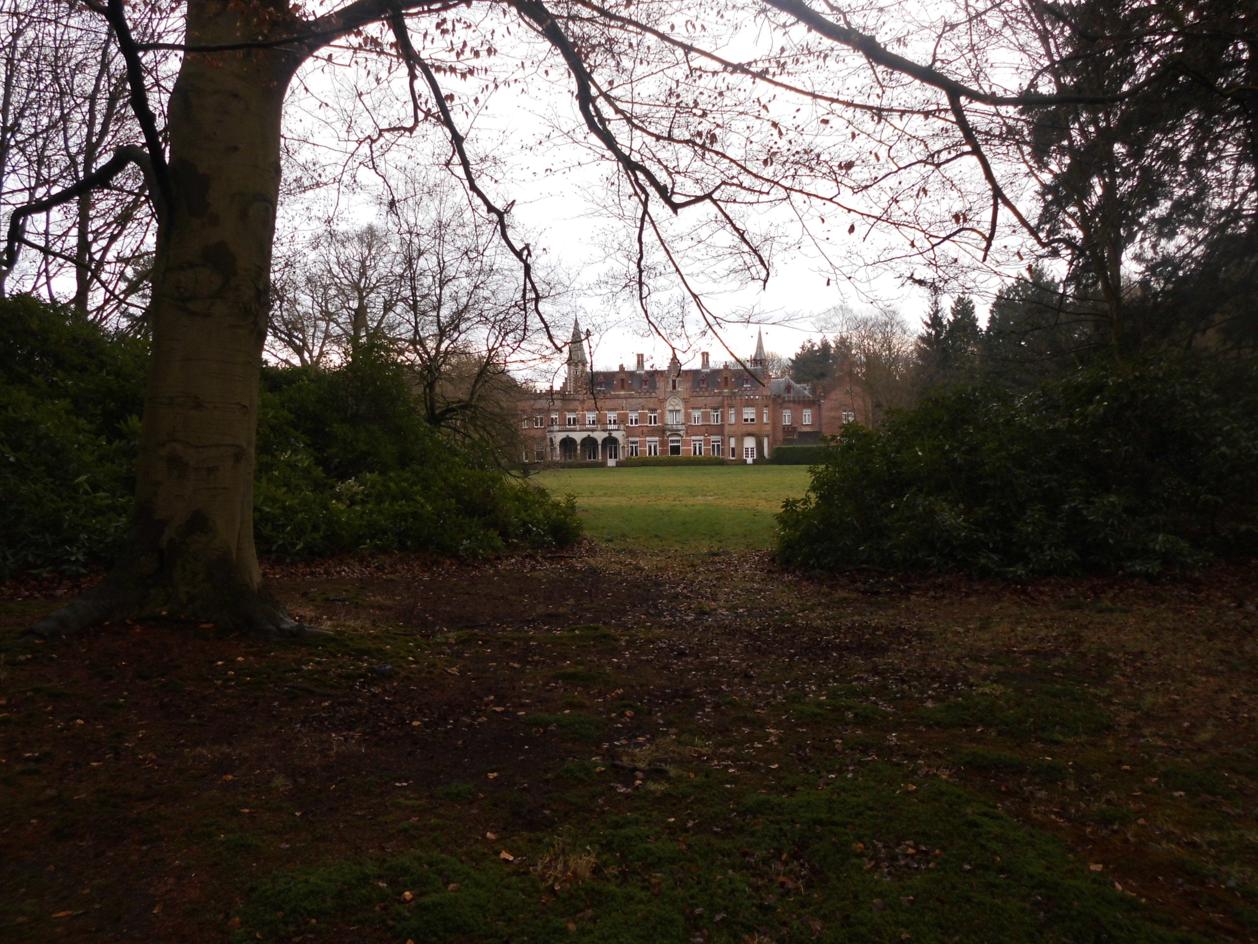 Kasteel Baesveld - Baesveld - Loppem - Zedelgem - West-Vlaanderen - België